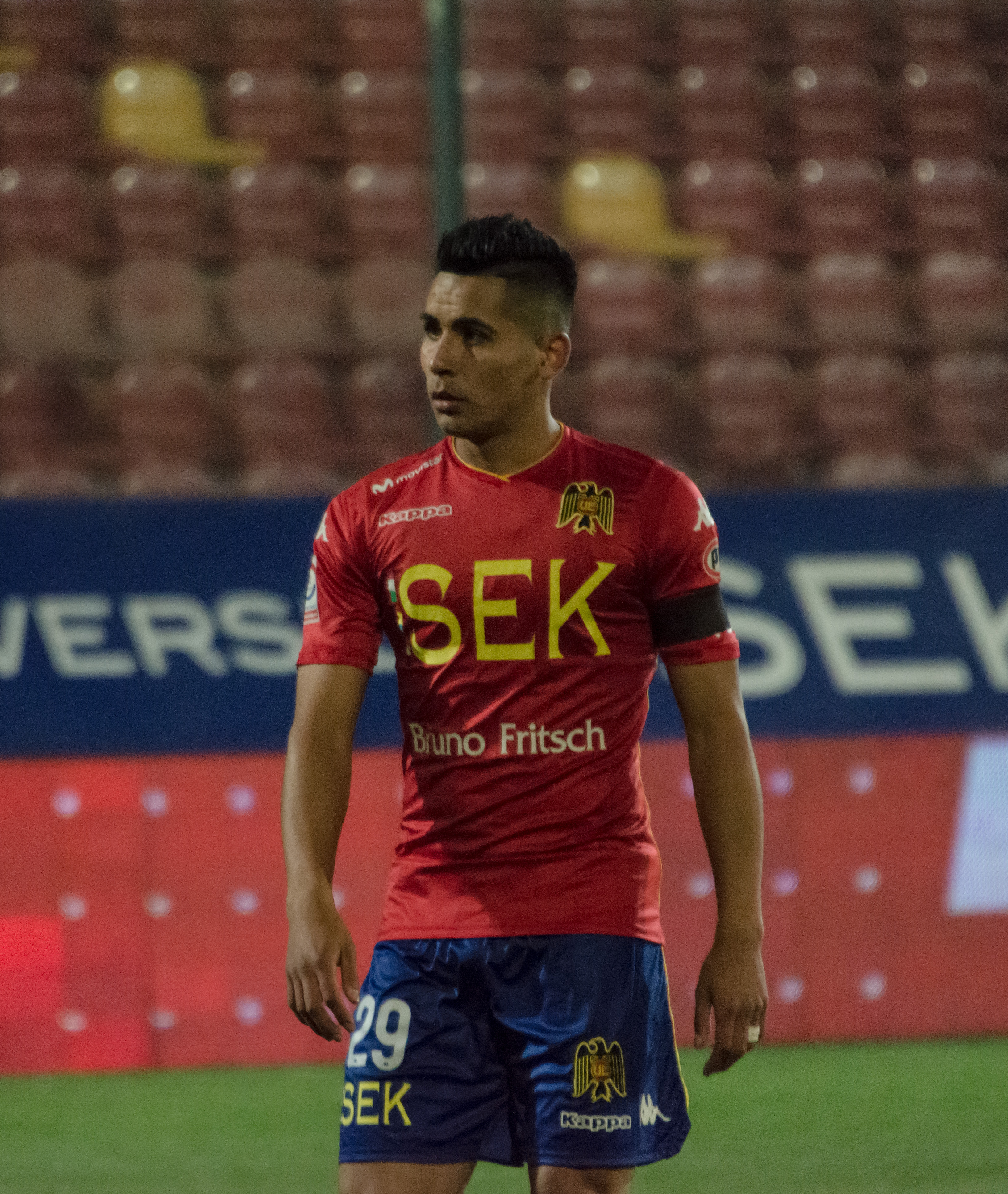 Luis Pavez Muñoz, Unión Española v Curicó Unido, Estadio Santa Laura, Independencia, Santiago, Chile